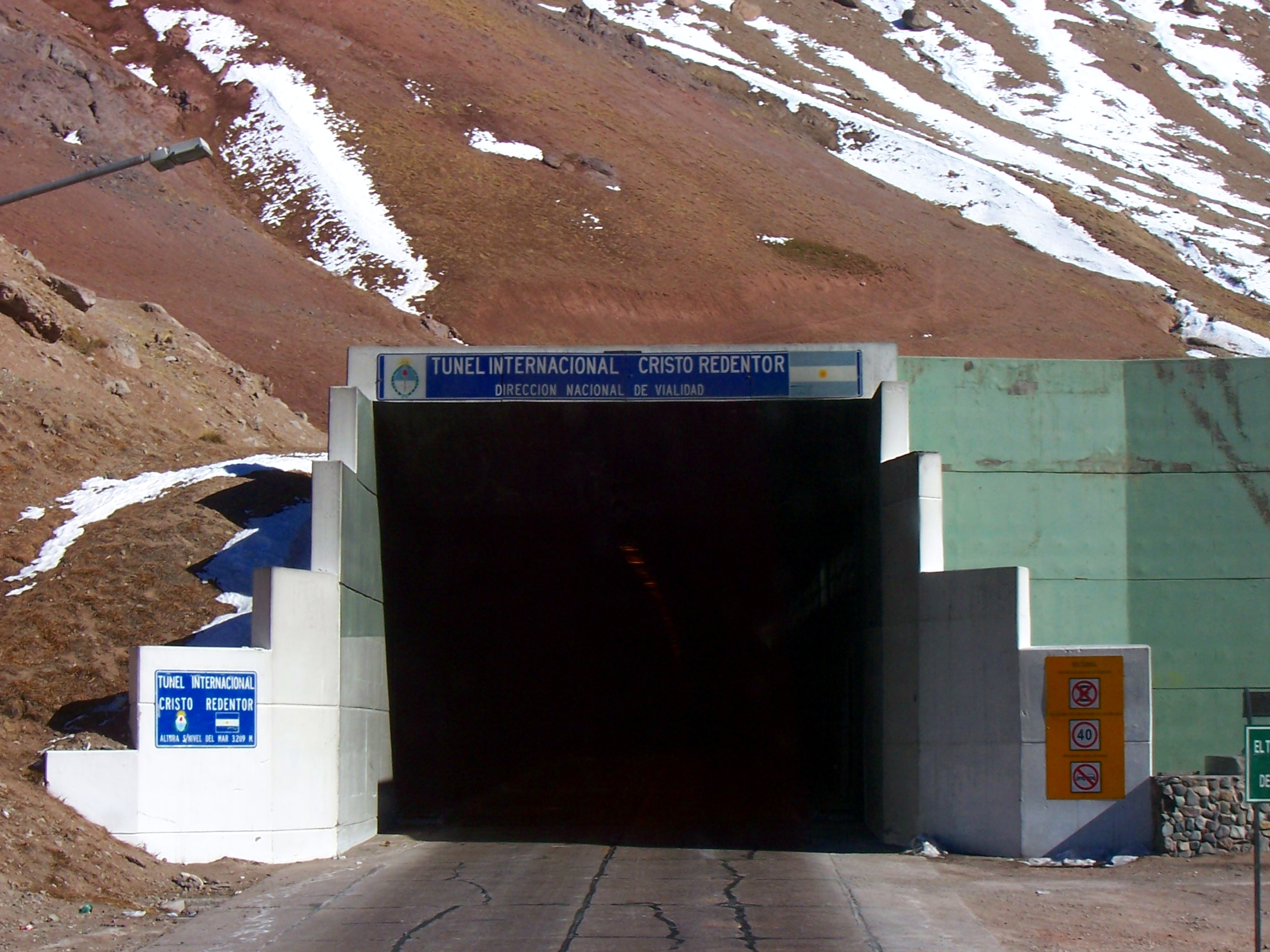 El Túnel Internacional Cristo Redentor que une la provincia de Mendoza (Argentina) con la región de Valparaíso (Chile).